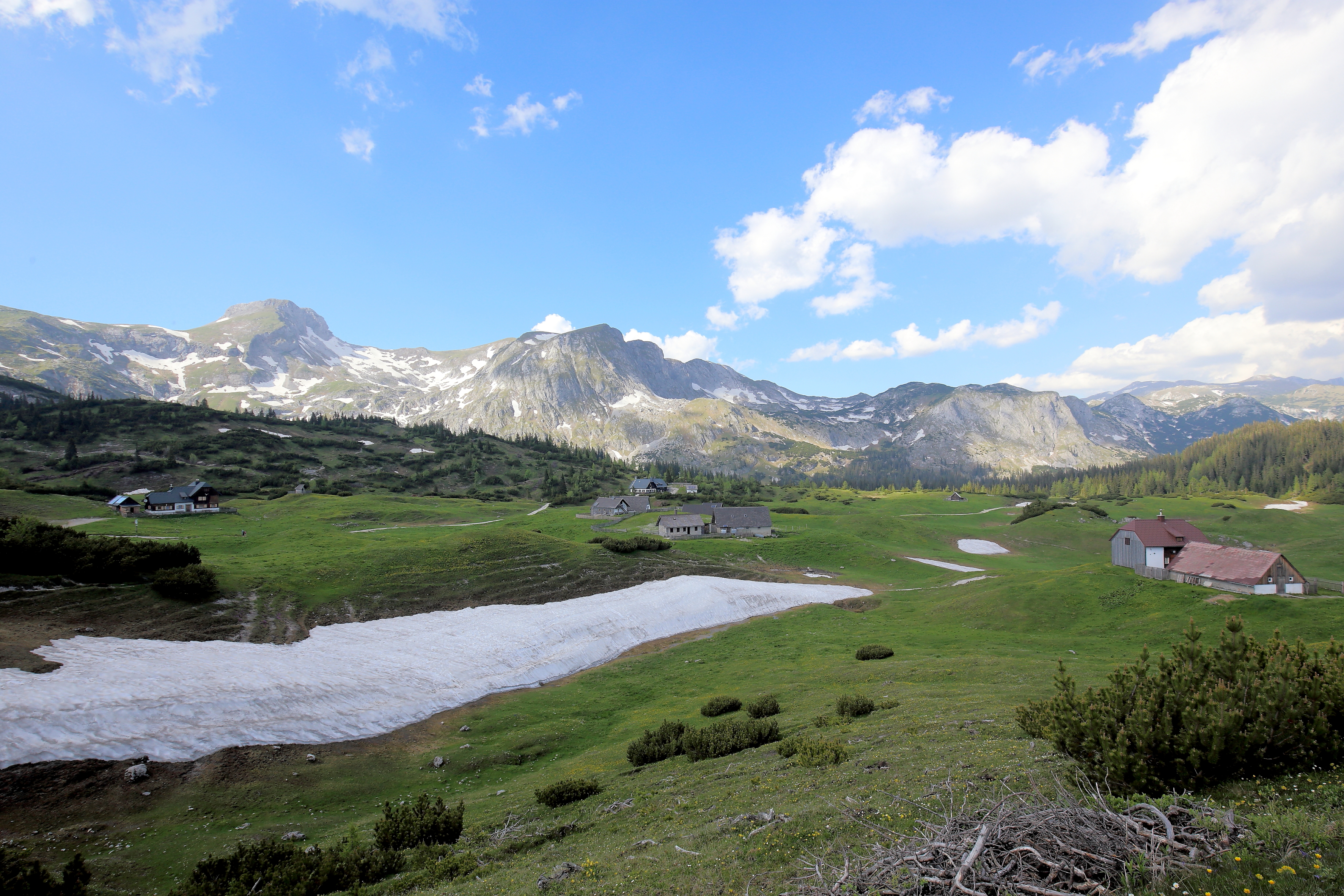 Südansicht der rund 1520 Meter hoch gelegenen Sonnschienalm auf dem Hochschwabmassiv der Nördlichen Kalkalpen in der Steiermark. Im Hintergrund von links nach rechts der Ebenstein (2123 m), der Vorderer und Hintere Polster (2057 m) und die Seemauer (1776m).